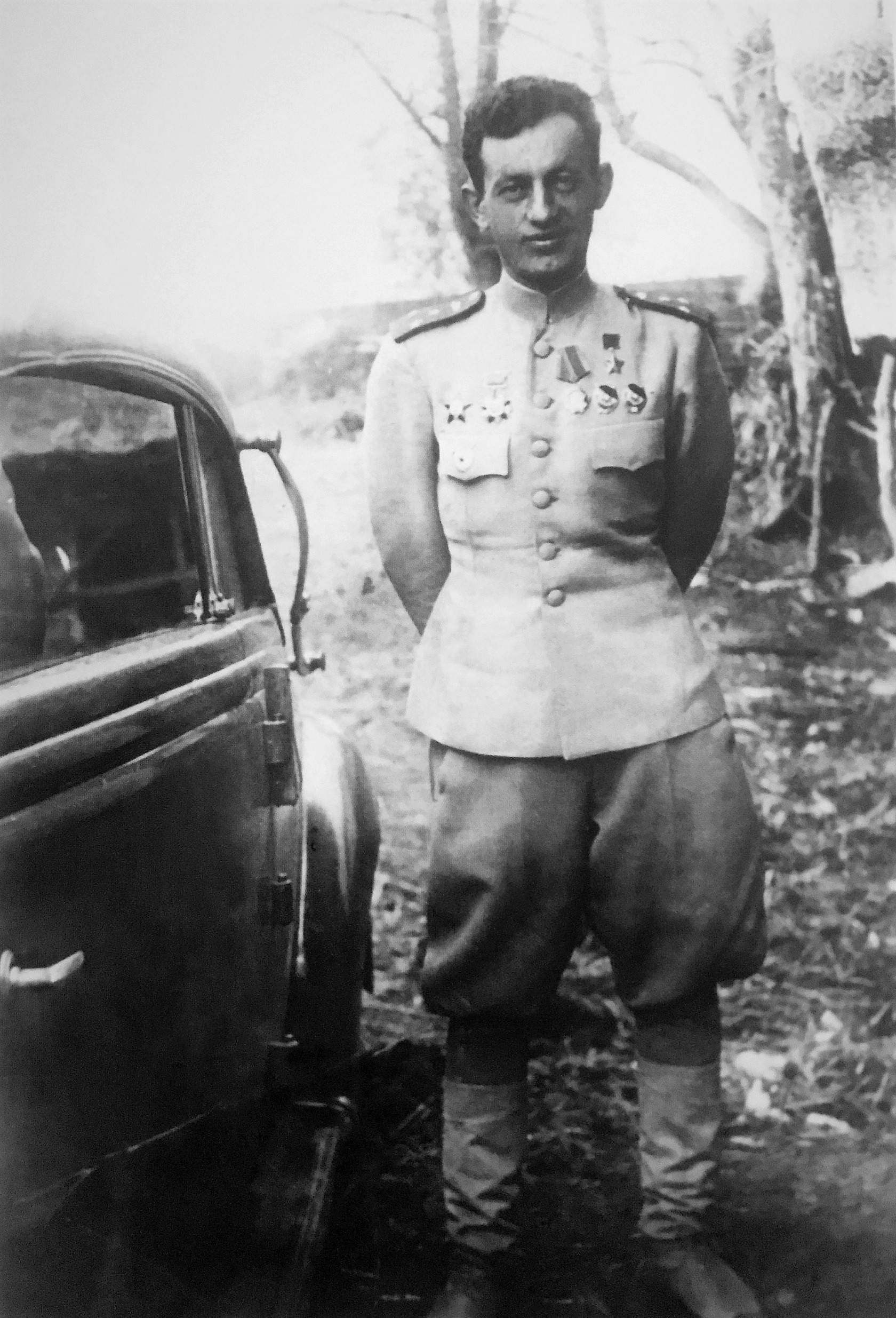 Командир 20-й гвардейской механизированной бригады Герой Советского Союза гвардии полковник А. Х. Бабаджанян